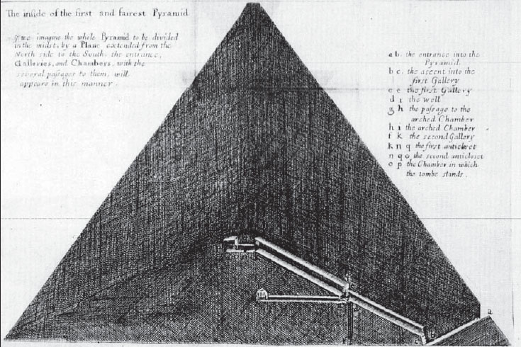 Coupe de la pyramide de Khéops tirée de la pyramidographia de johne greaves parue en 1646